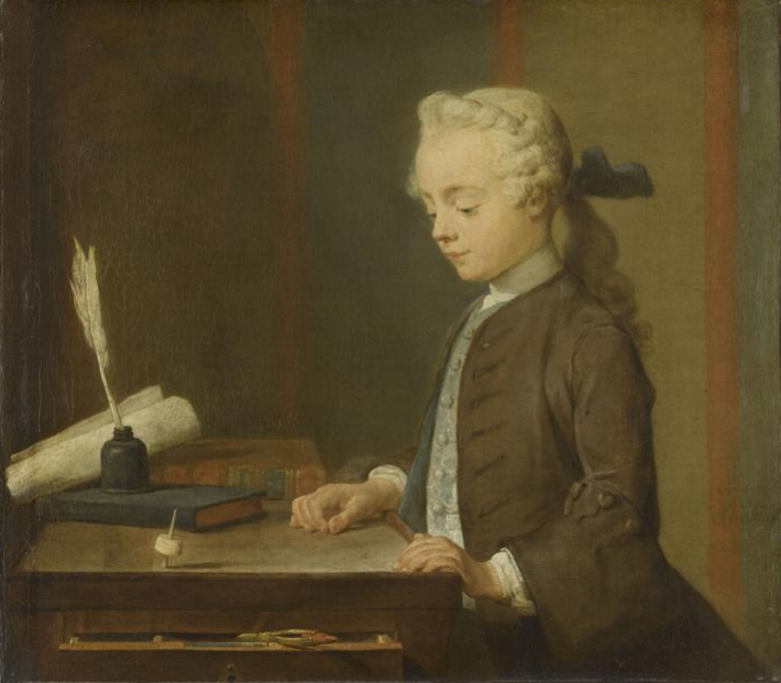 Portrait d’Auguste-Gabriel Godefroy (1728-1814), fils cadet du joaillier Charles Godefroy. Ce portrait d’un jeune garçon jouant à la toupie (toton), est l'image intemporelle de l'enfant absorbé dans son monde de jeux et de rêves. Il évoque l'intérêt nouveau accordé au 18e siècle à l'enfance par les écrivains, tel Jean-Jacques-Rousseau (1712-1778), et les artistes.